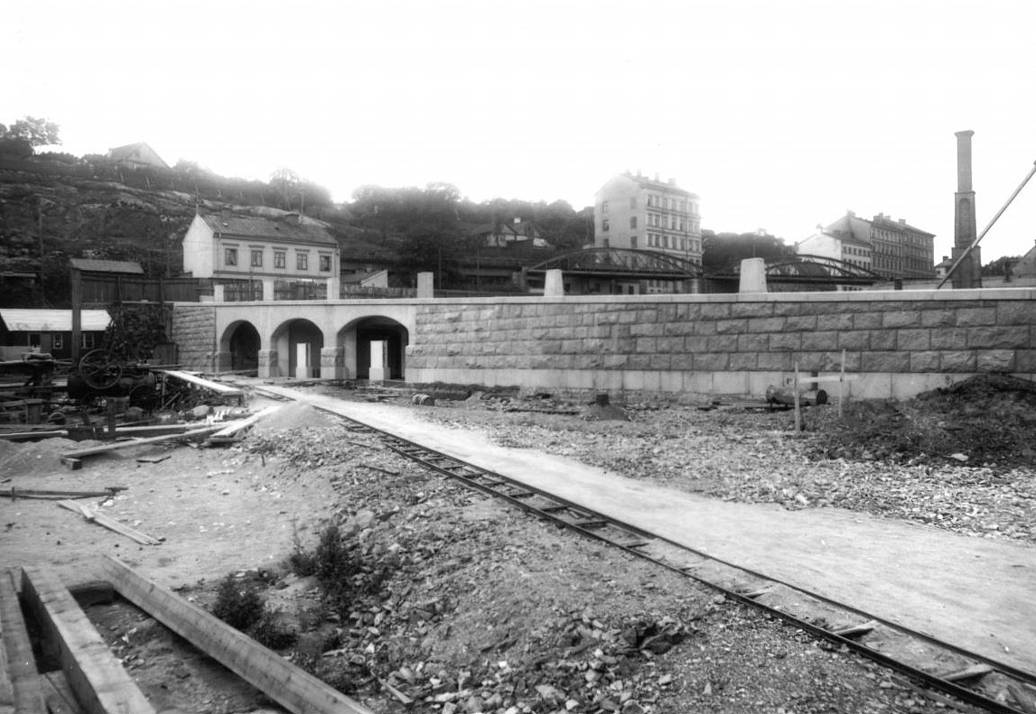 Londonviadukten under uppförande